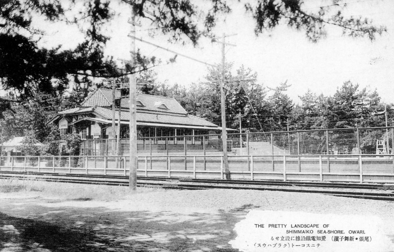 舞子館の傍に開設されたテニスコート